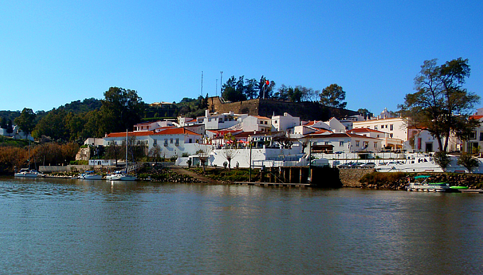 Alcoutim (Portugal)